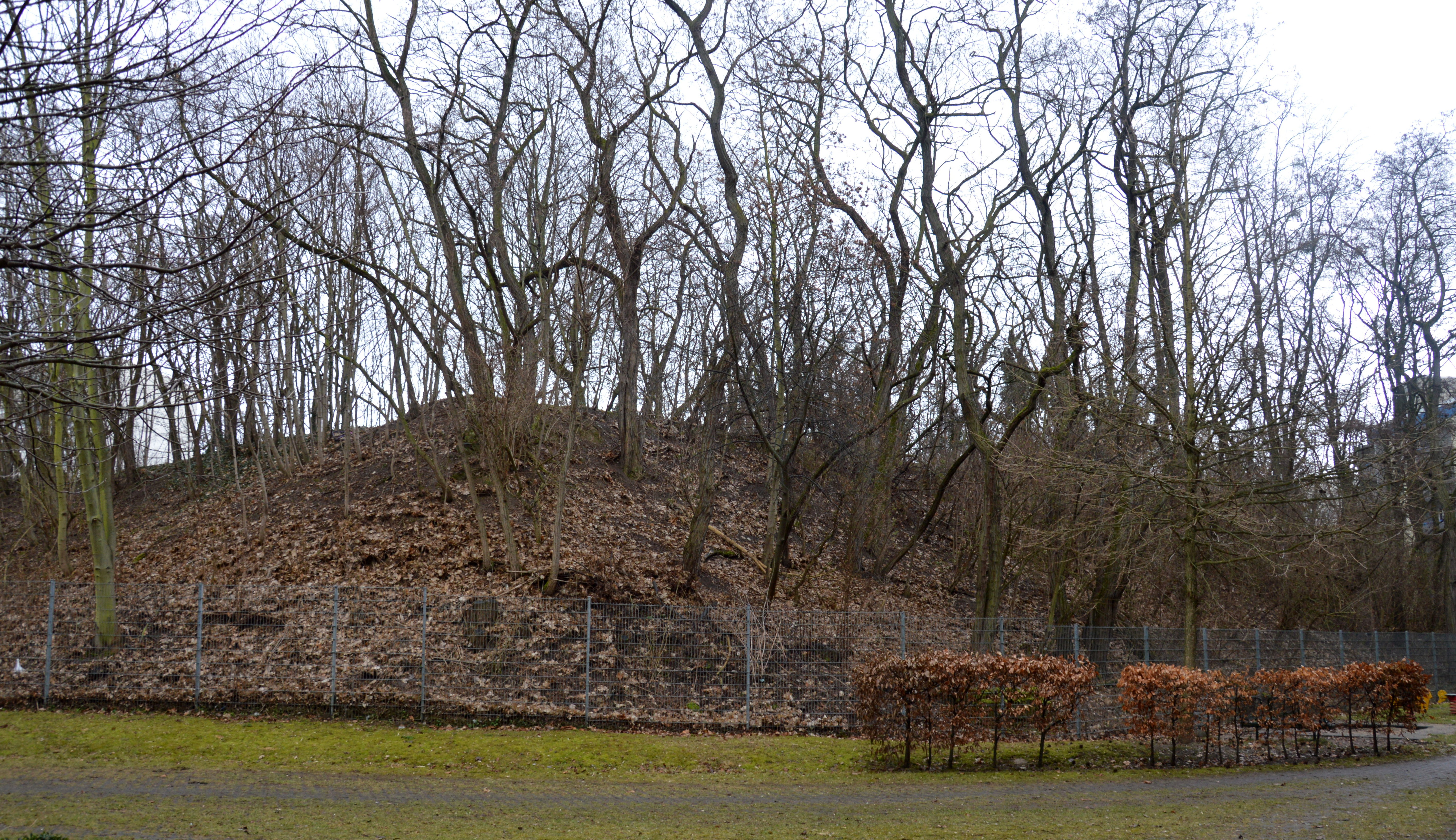 Bastion Hessen